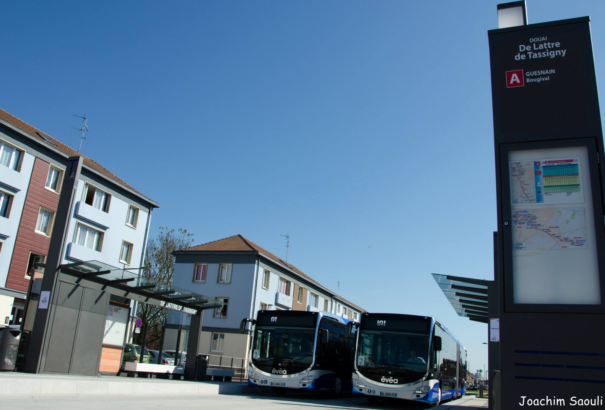 Évéa line A Douai De Lattre de Tassigny extension